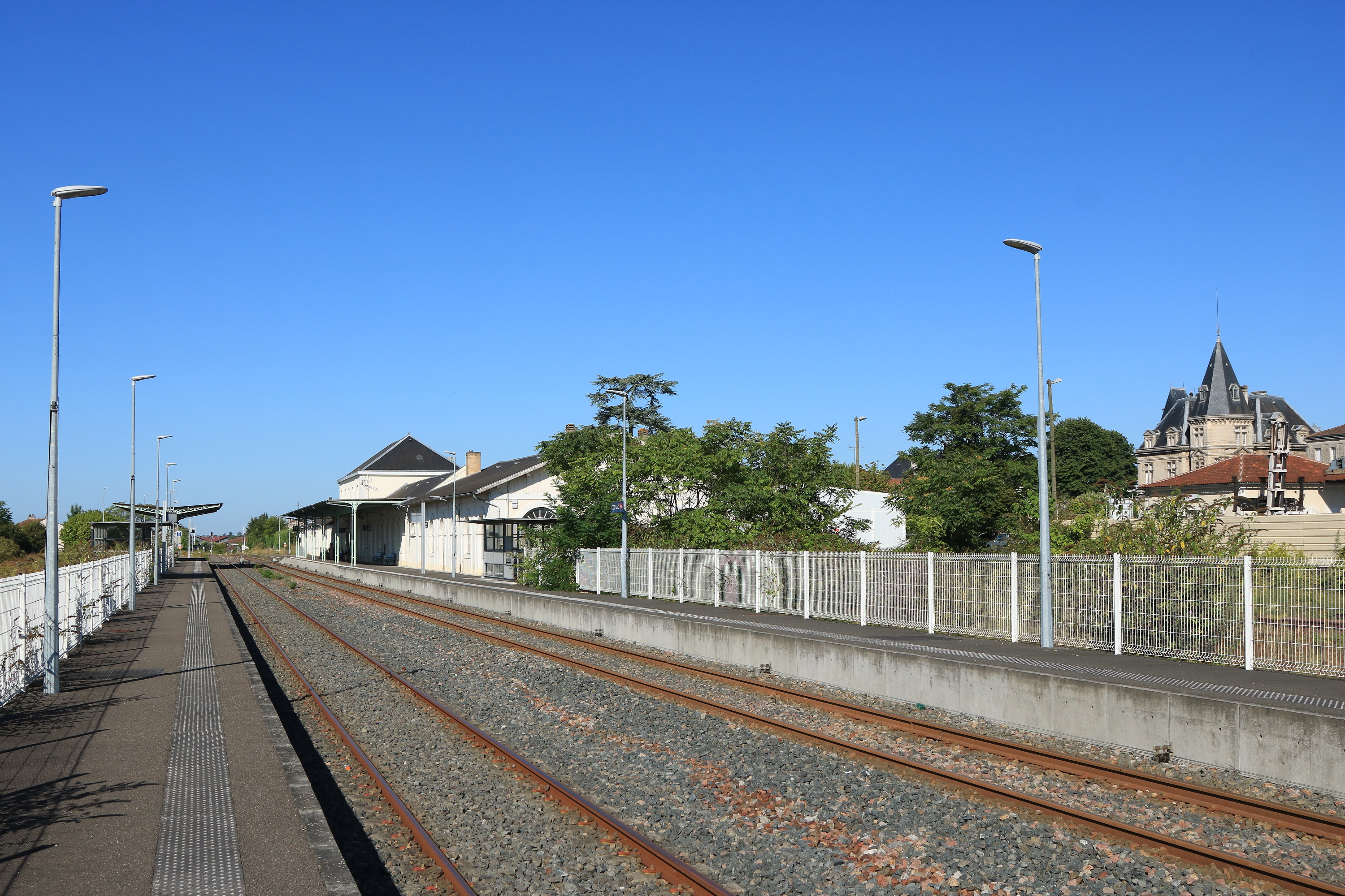 Gare de Cognac vue en direction de Saintes.